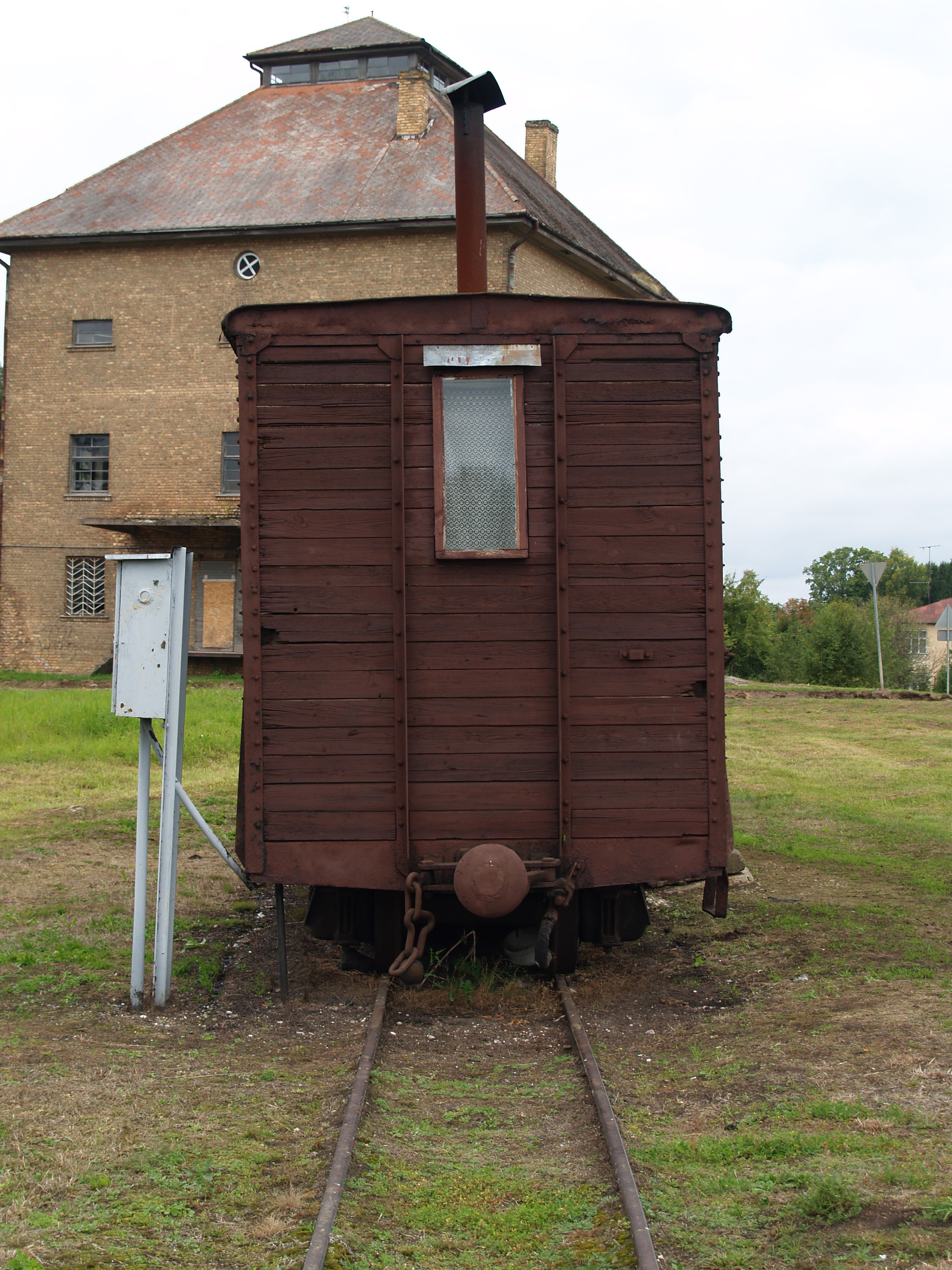 Alūksne kitsarööpalise raudtee vagun